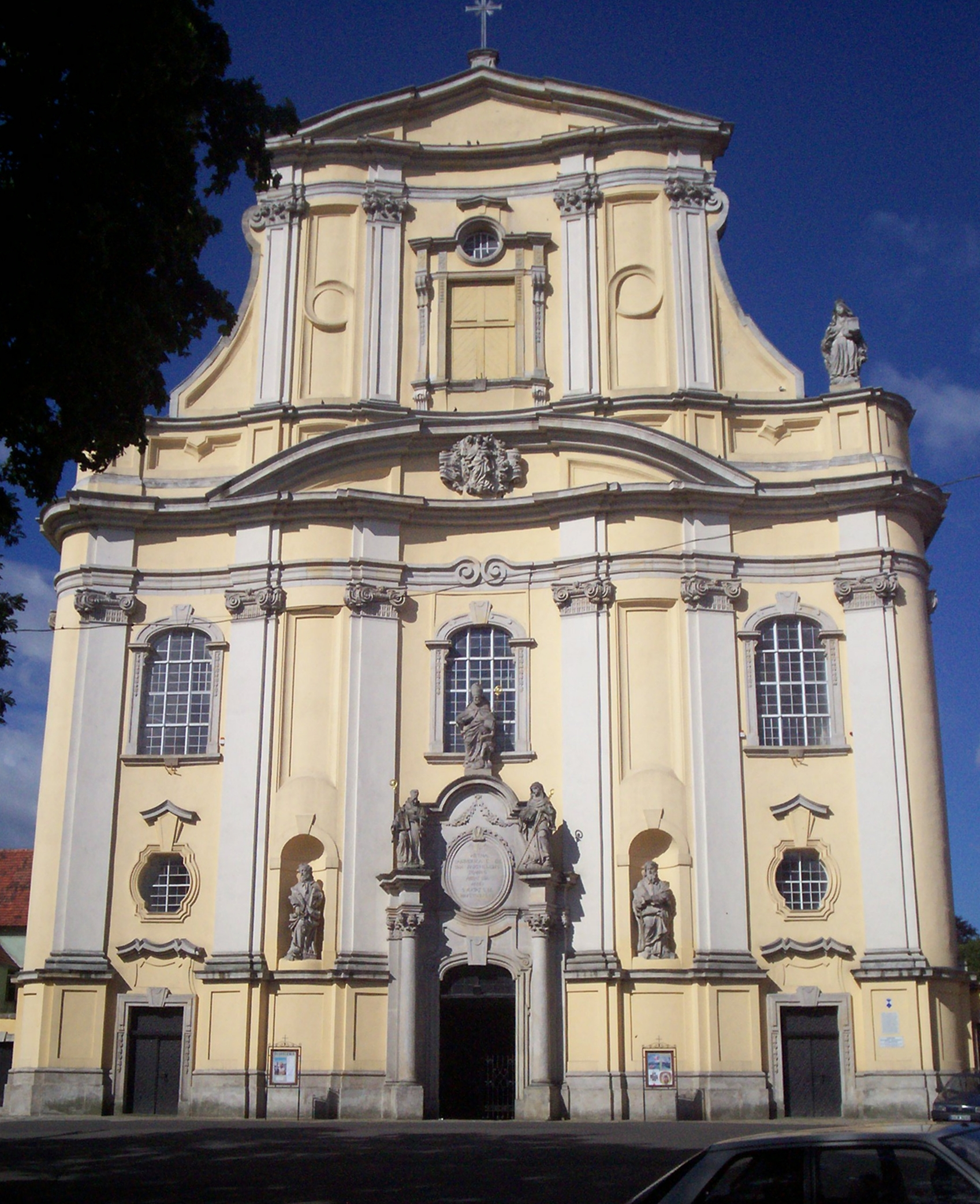 Lubomierz, kościół pw. Wniebowzięcia NMP i Św. Maternusa.